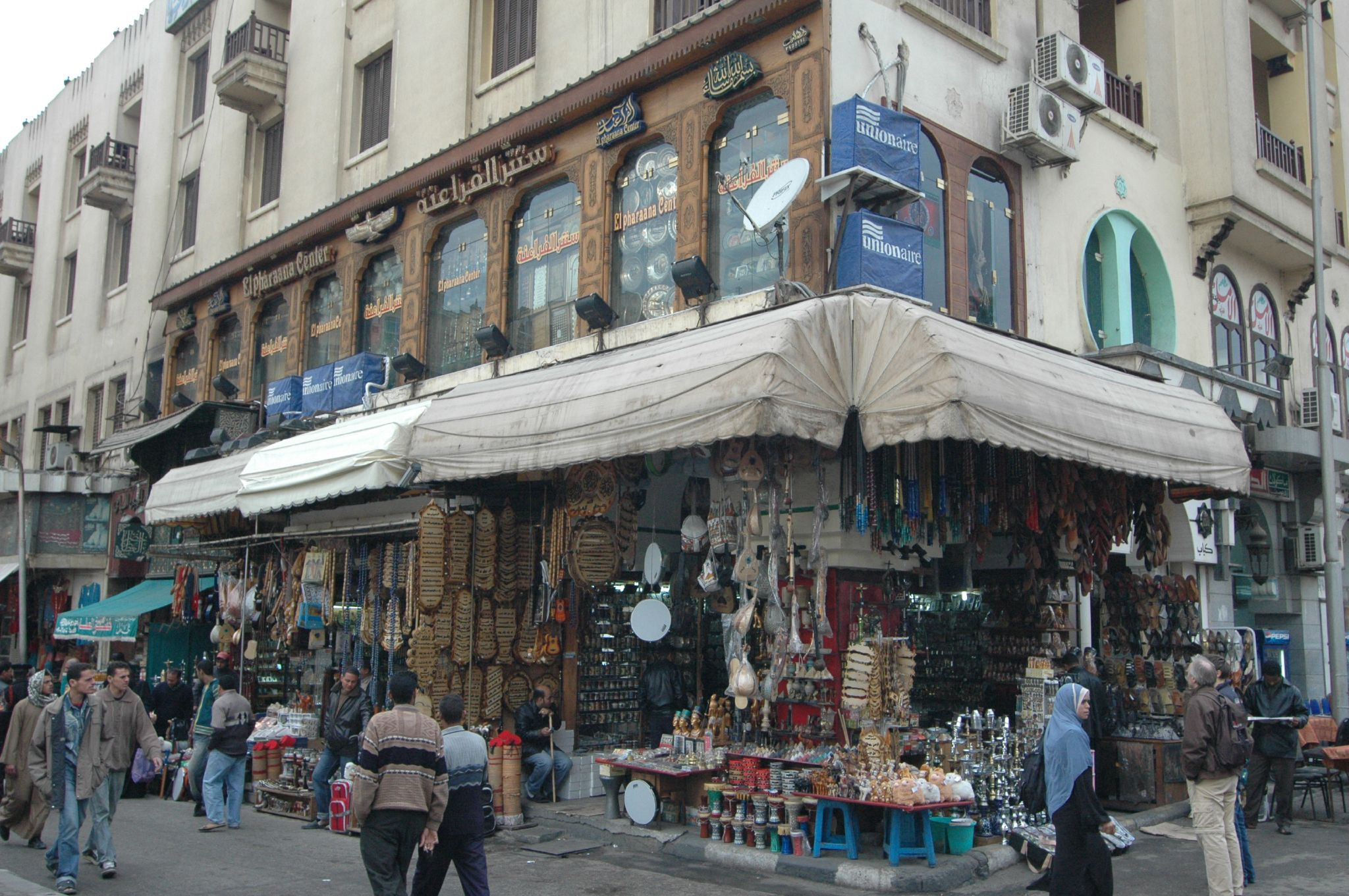 Cairo: Kahn el-Khalili souk—bazaar.